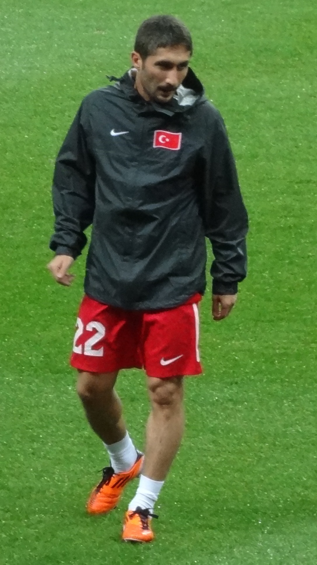 Sabri Sarıoğlu Milli formayla